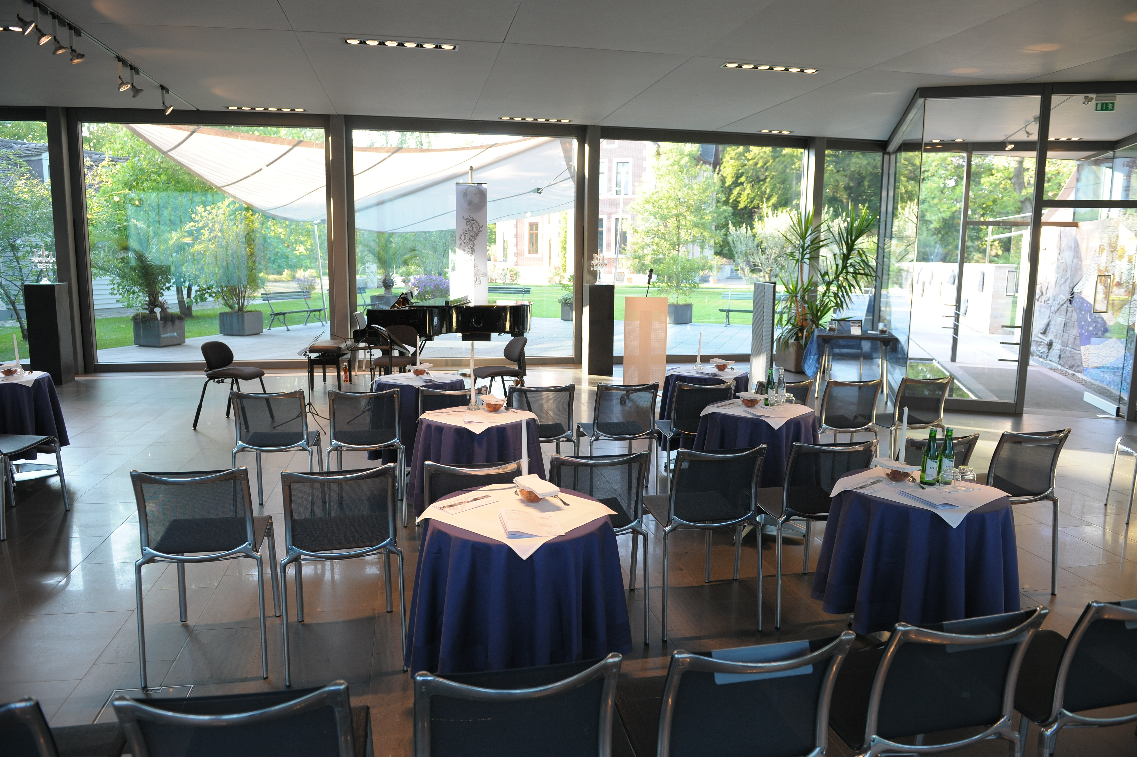 Konzertsaal des Hirzen Pavillons (Gauer Itten Messerli Architekten AG) mit Blick auf den Garten und die Villa zu den Hirzen auf dem Bäumlihofgut in Riehen (Schweiz)